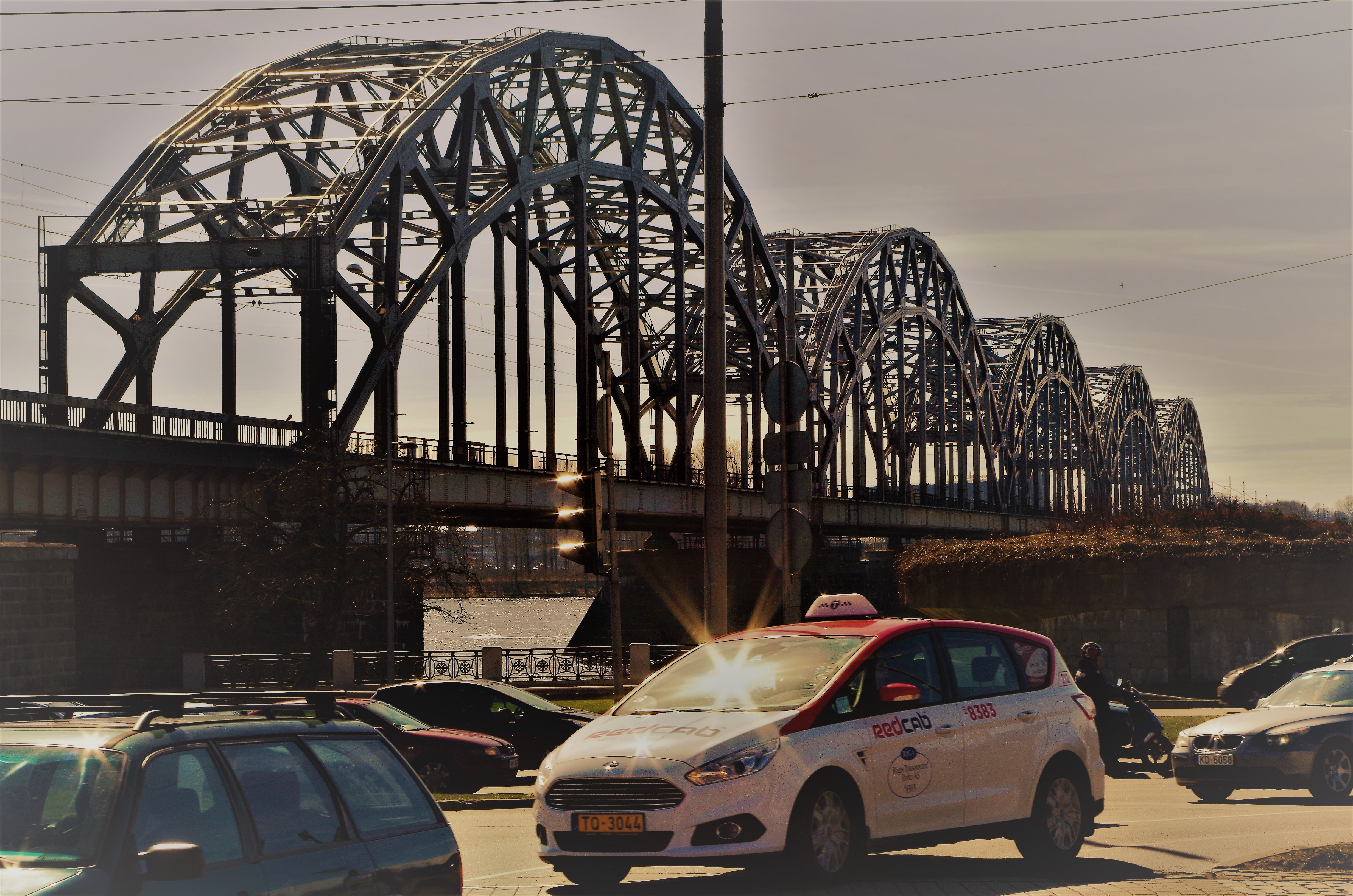 Die 1914 fertiggestellte Daugava-Eisenbahnbrücke in Riga